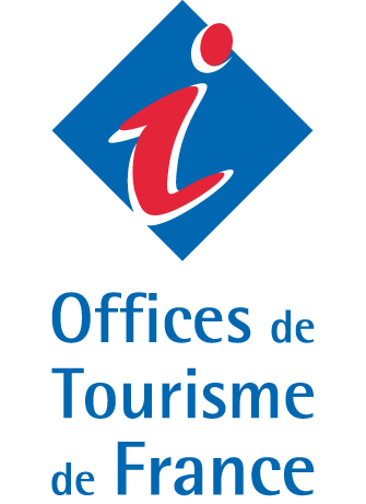 Voici le nouveau logo des Offices de Tourisme de France